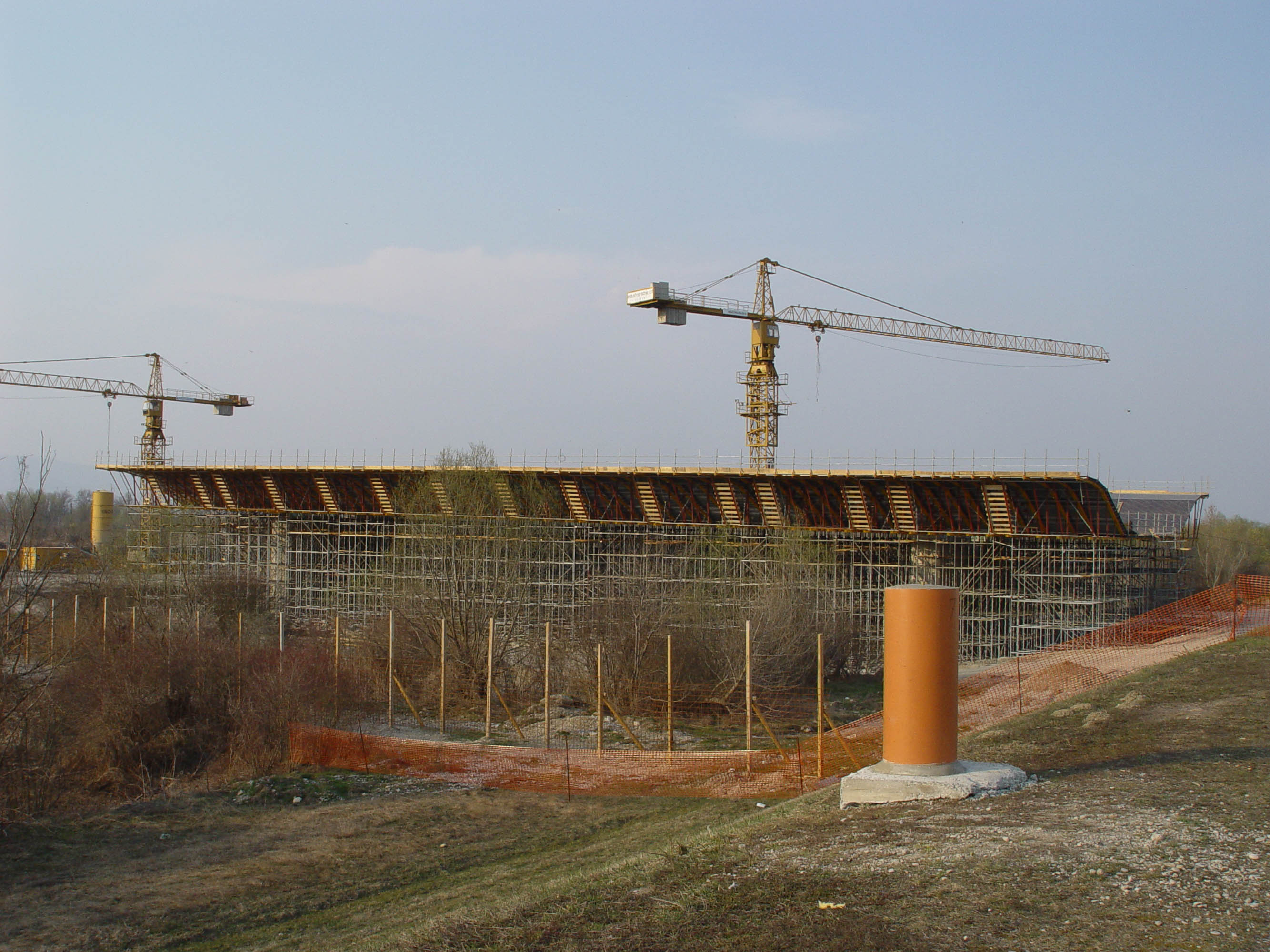 Slika početne konstrukcije Domovinskog mosta